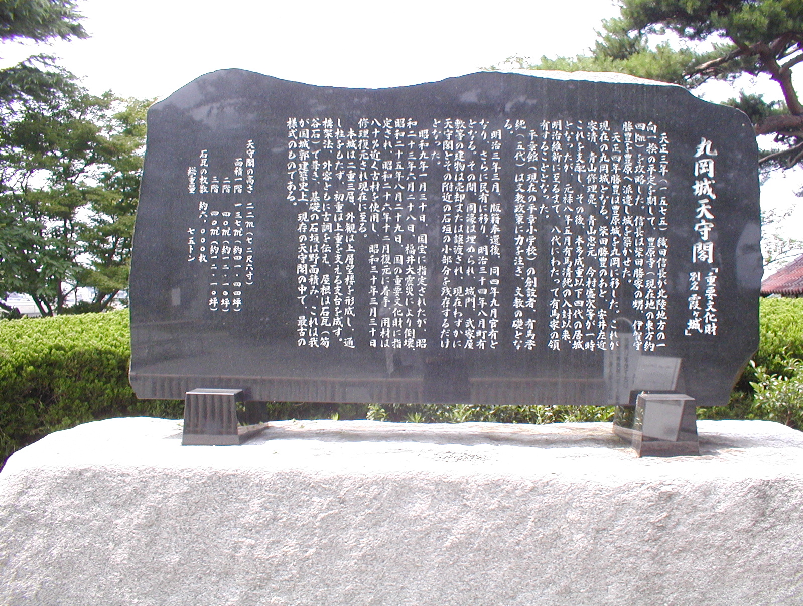 Stone tablet at Maruoka Castle